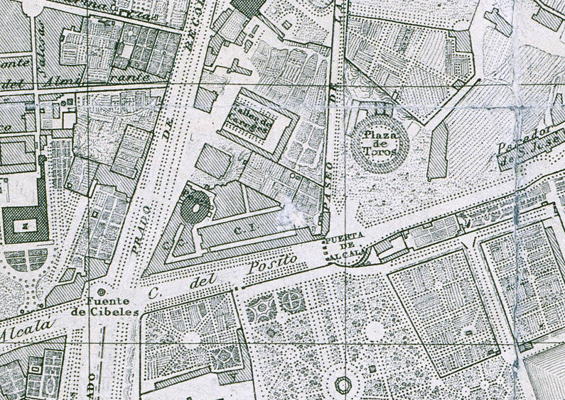 Plano de Madrid, 1848, de Francisco Coello.